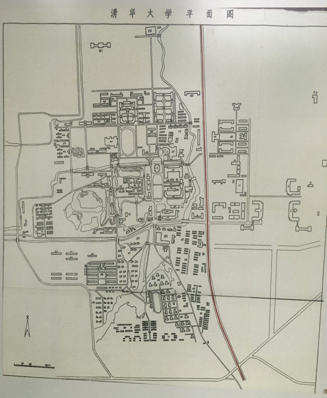 紅色線為原京張鐵路